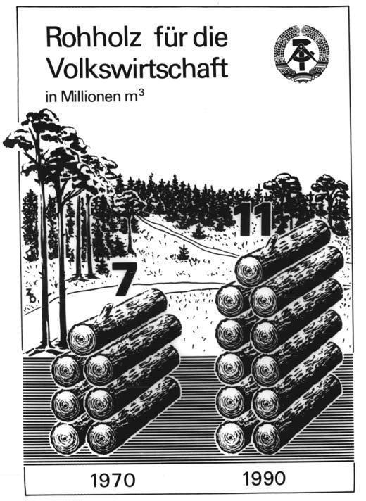 Infografik, Rohholz für die Volkswirtschaft ADN-ZB Grafik 26.1.1988-fr-Rohholz für die Volkswirtschaft- Kaum ein Zweig der Volkswirtschaft kommt ohne Holz aus. Es ist der Grundstock für mehr als 12.000 Erzeugnisse. Die Zellstoff- Papier- und Verpackungsindustrie beansprucht fast die Hälfte des Aufkommens an Holz. Unentbehrlich ist es im Bauwesen, der Möbelindustrie oder im Bergbau. Der Wald liefert jährlich 11.000 Tonnen Harz, das wiederum Ausgangsmaterial für zahlreiche Erzeugnisse ist, so für Terpentin und Kolophonium